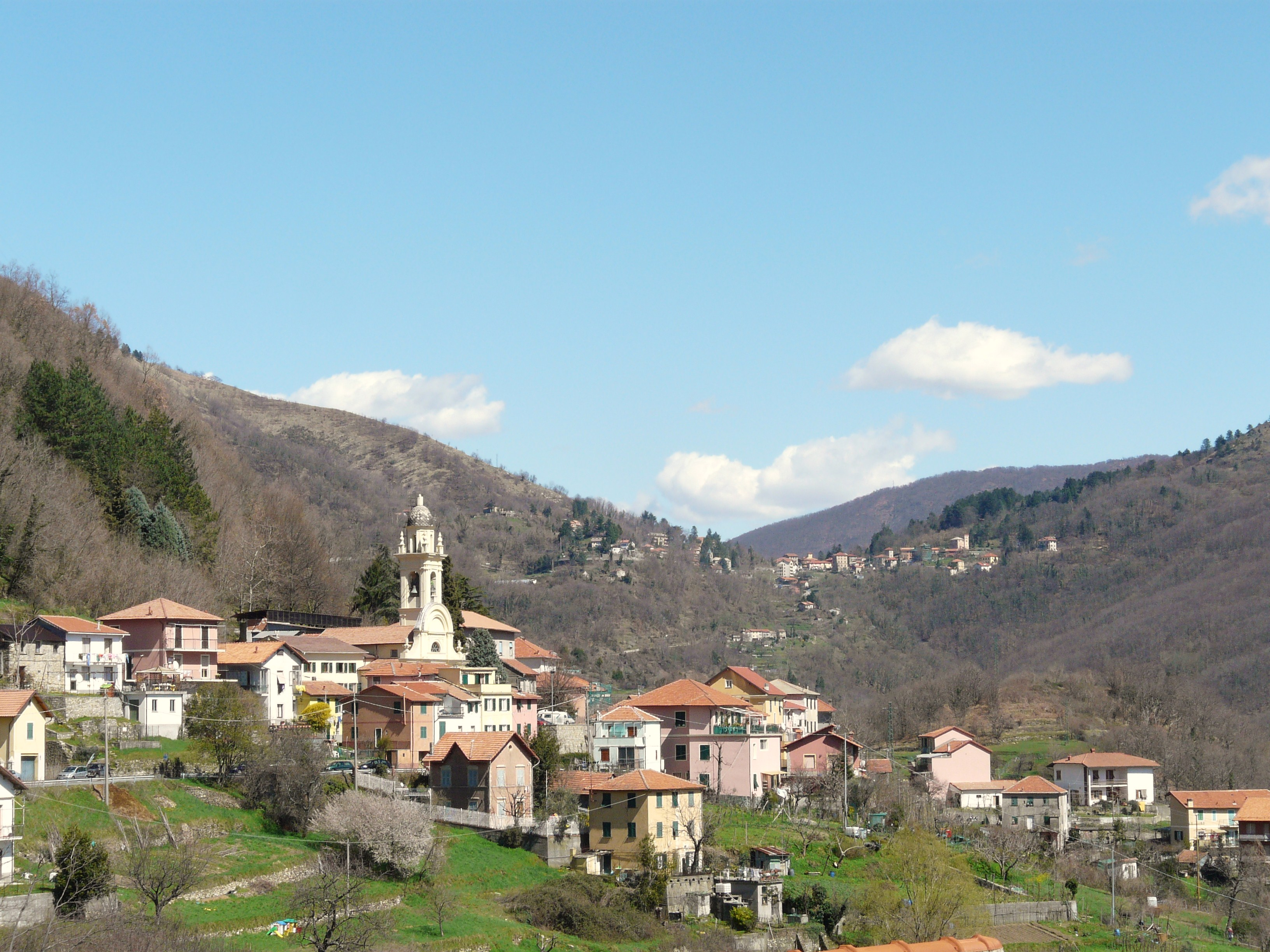 Davagna, Liguria, Italia